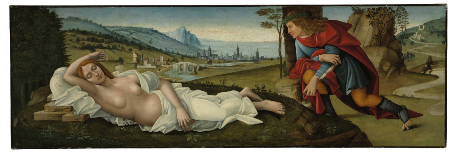 Cymon and Iphigenia